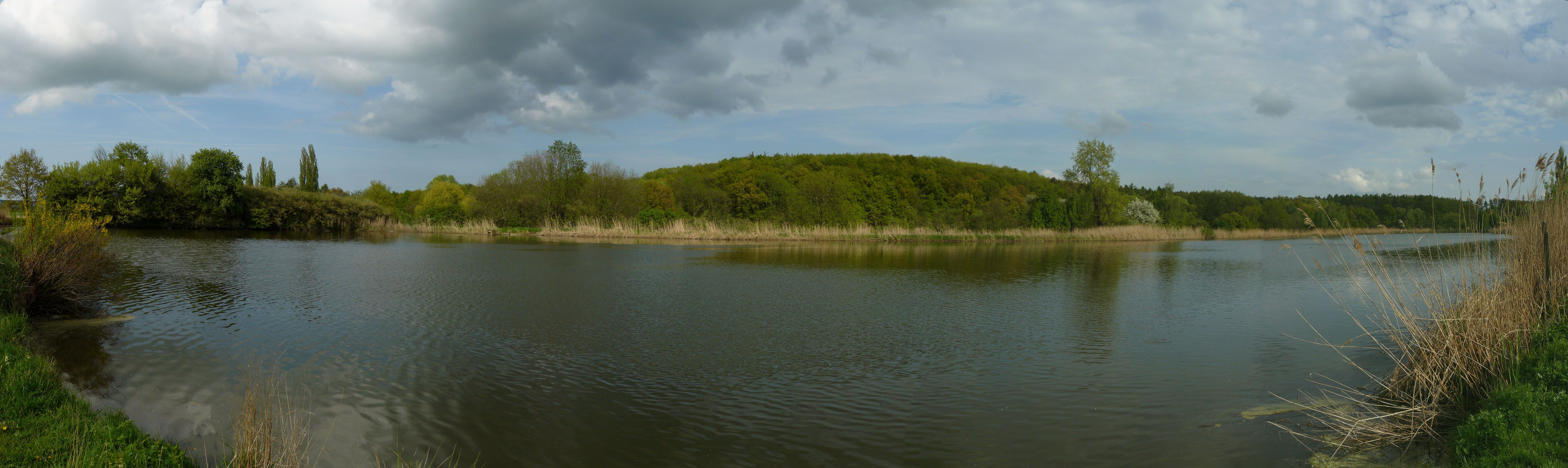 Přírodní památka Lítožnice. Panoramatický pohled od západu.